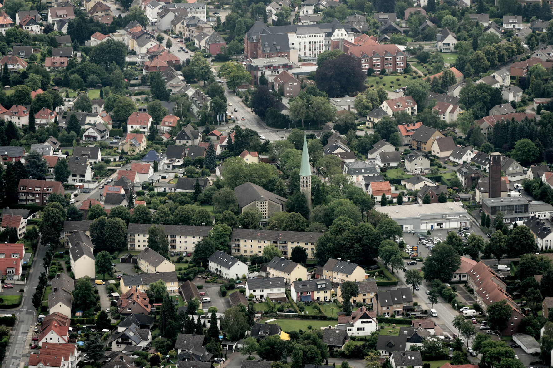 Werl: Unnaerstraße Ecke Kucklermühlenweg (links) und Lindenallee (rechts). In der Mitte die St. Norbert-Kirche, am oberen Bildrand das Mariannen-Hospital. Fotoflug Sauerland Nord. The making of this document was supported by the Community-Budget of Wikimedia Germany.